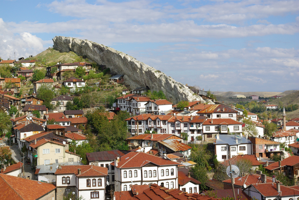 Beypazarı, Ankara